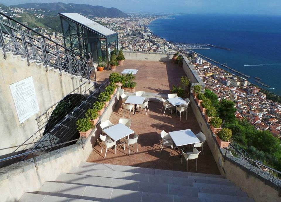 Il castello Arechi di Salerno